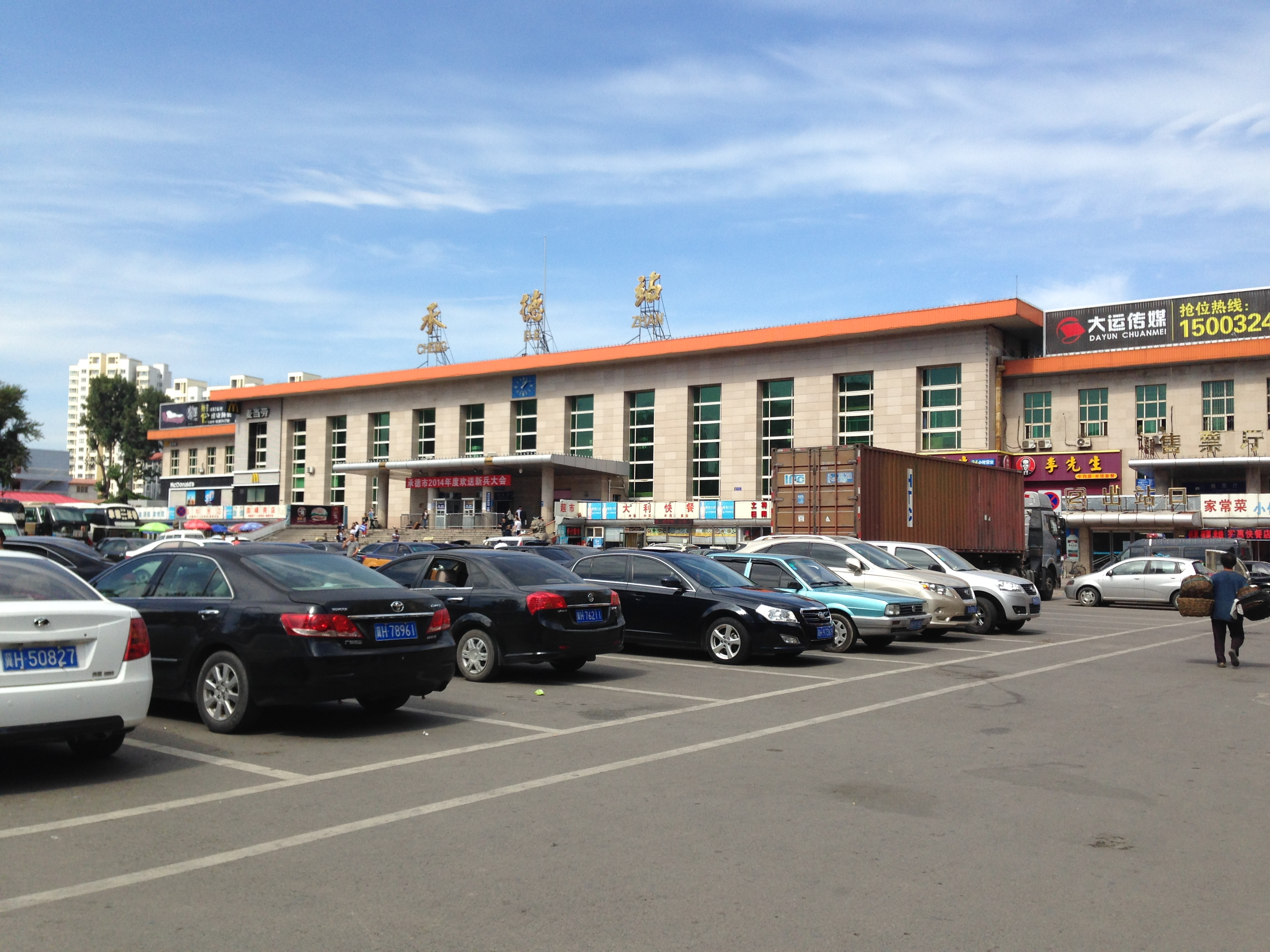 承德站站房